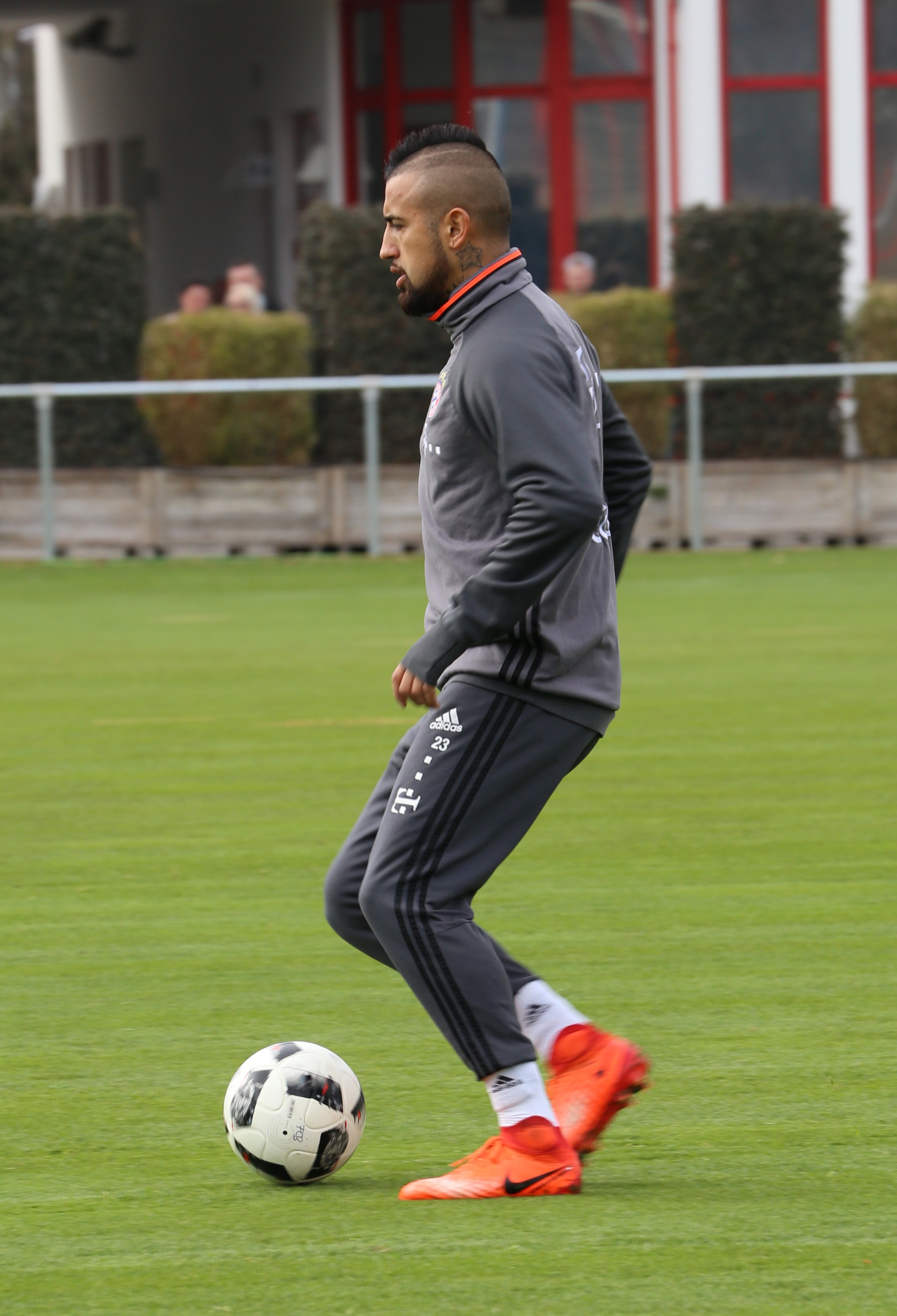 Arturo Vidal, am 14. März 2017 beim Training auf dem Gelände des FC Bayern München